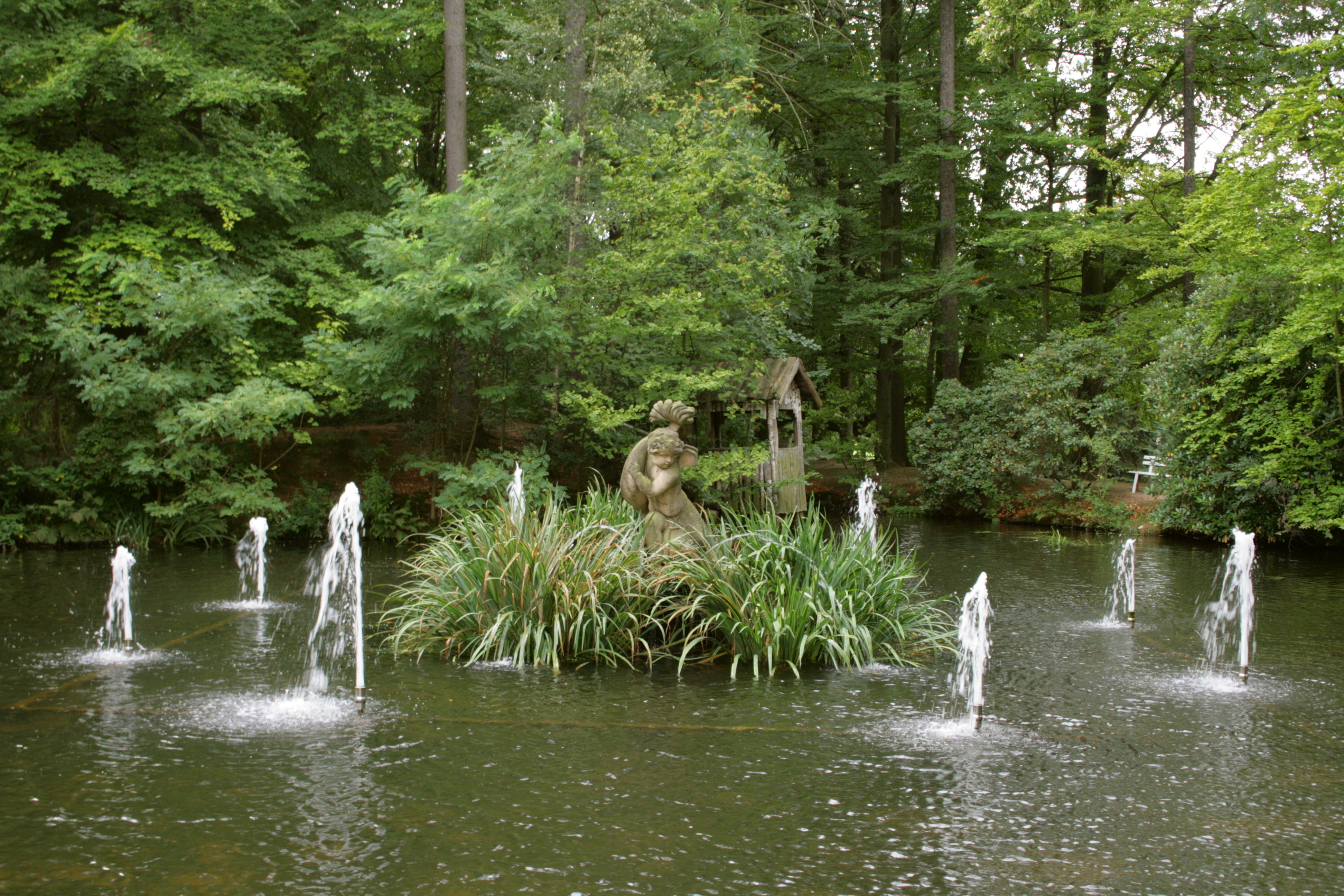 Johann-Gottlieb-Fichte-Park am Barockschloss Rammenau in Rammenau